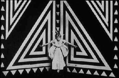 Foto di scena di Thaïs, 1917. regia di Anton Giulio Bragaglia e Riccardo Cassano, produz. "Novissima Film" - Roma